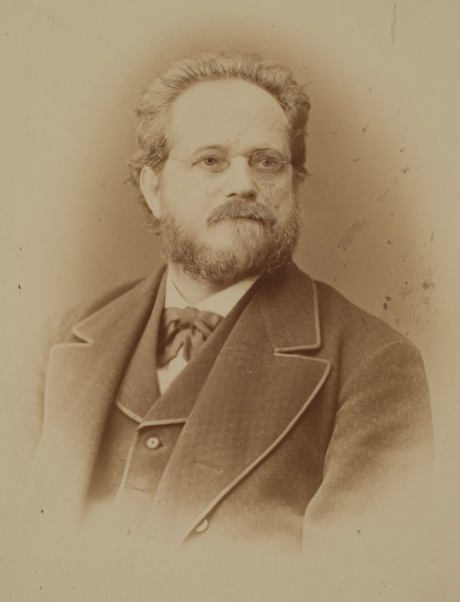 Ludwig Carl Friedrich Nohl, Musikwissenschaftler, 1881–1885 Professor in Heidelberg